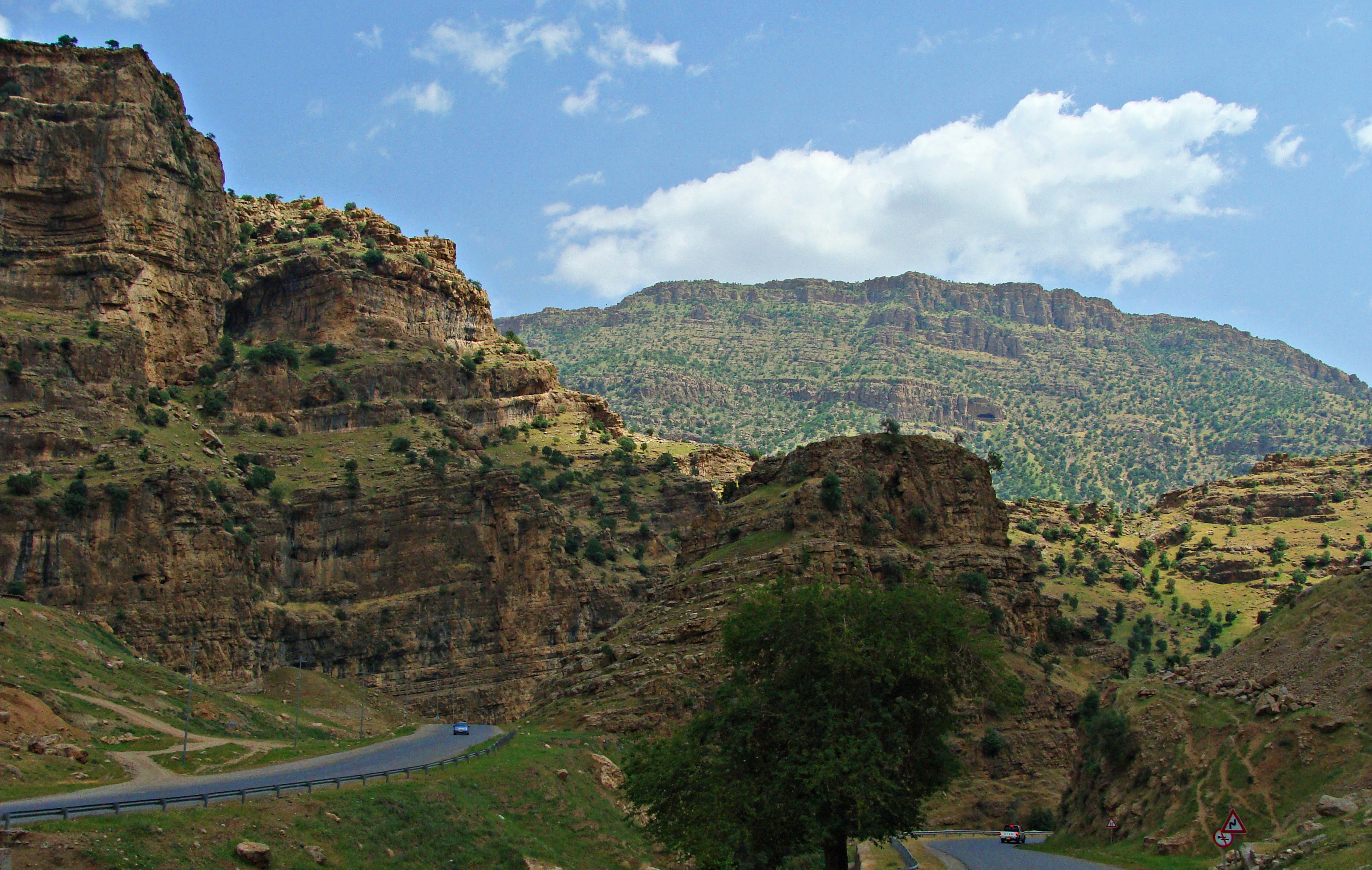 Irak: Zagrosgebirge in der Provinz Erbil